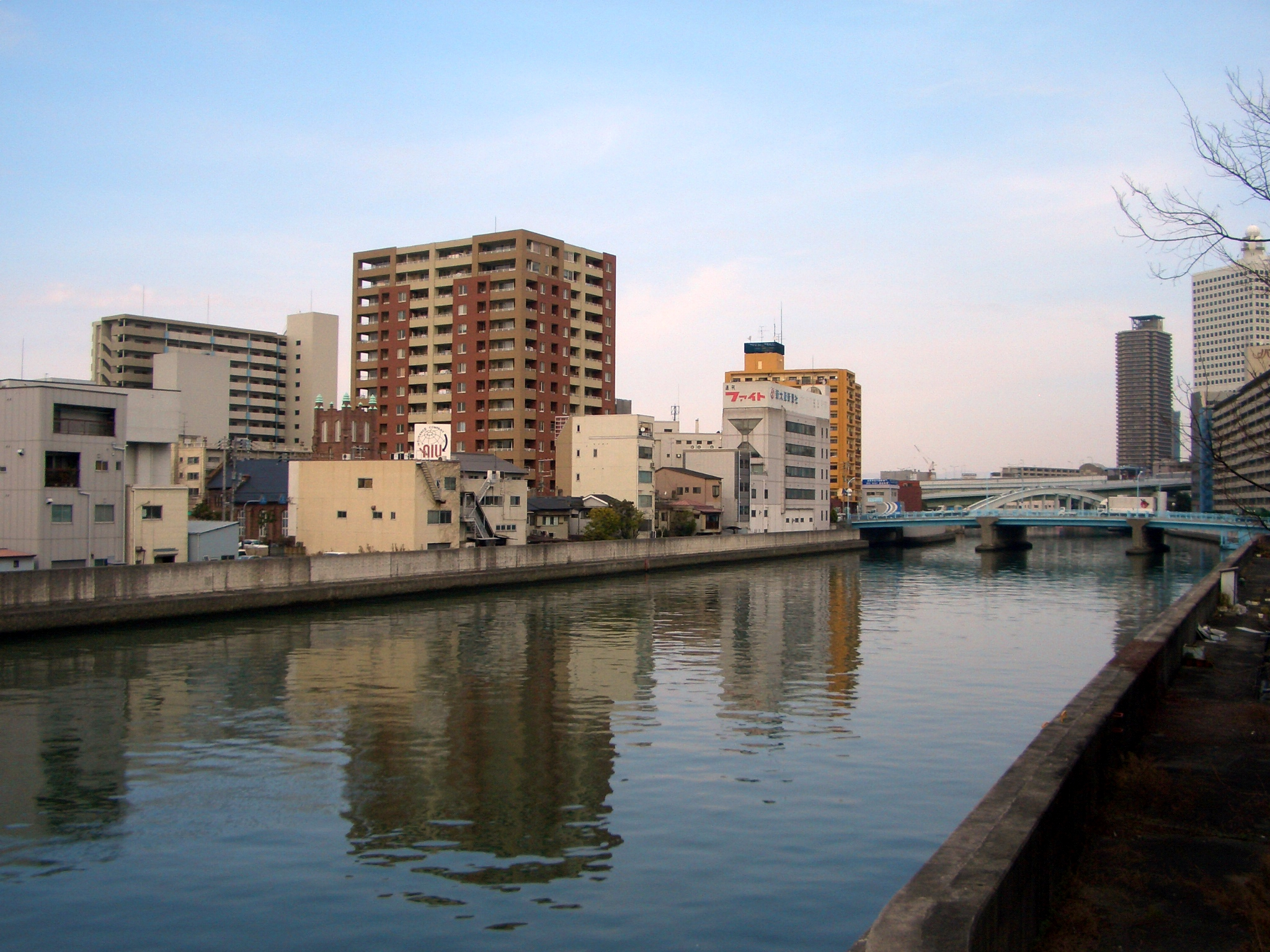 Kizu River in Osaka,Japan. 木津川（大阪）